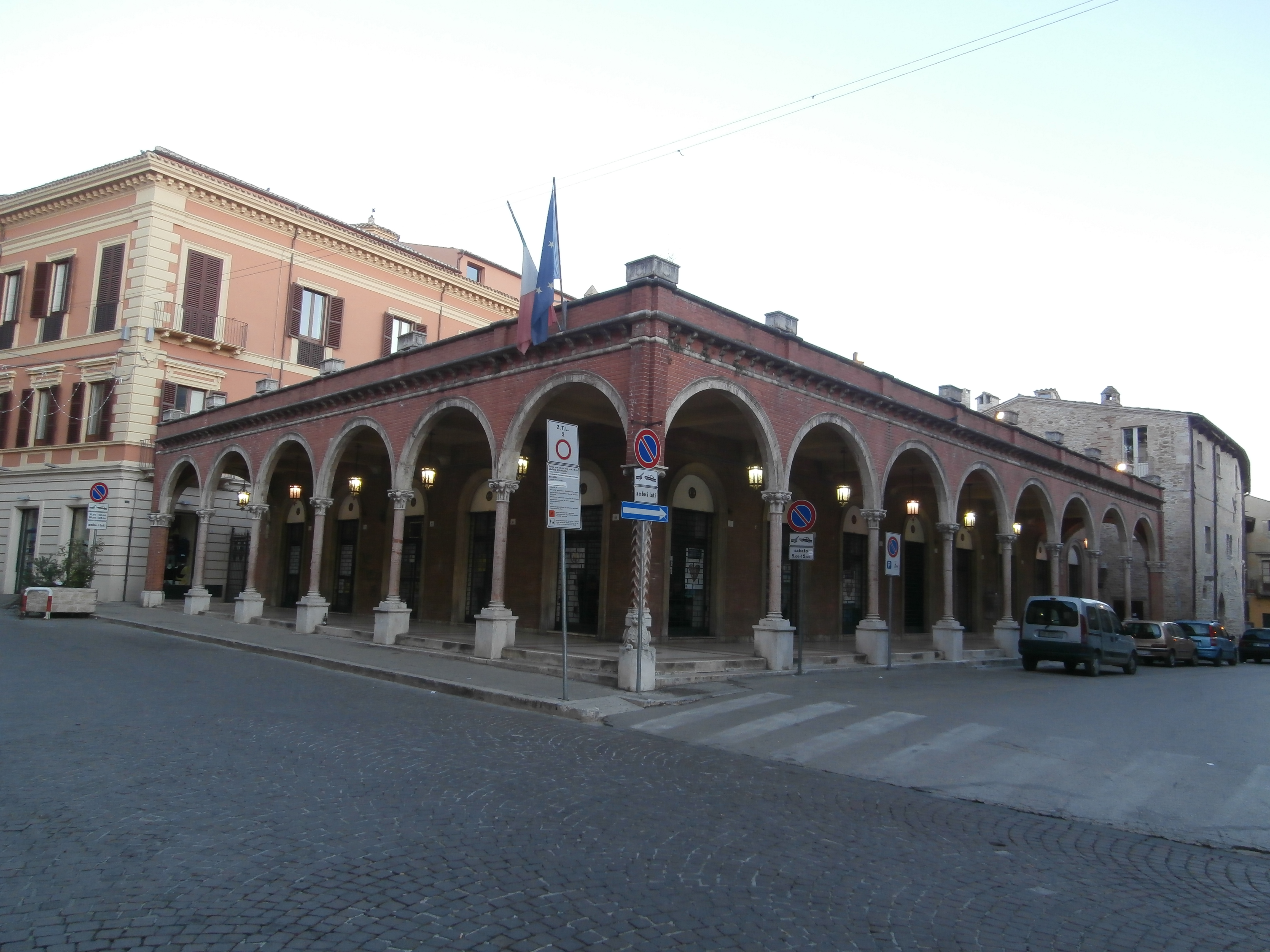 Portici